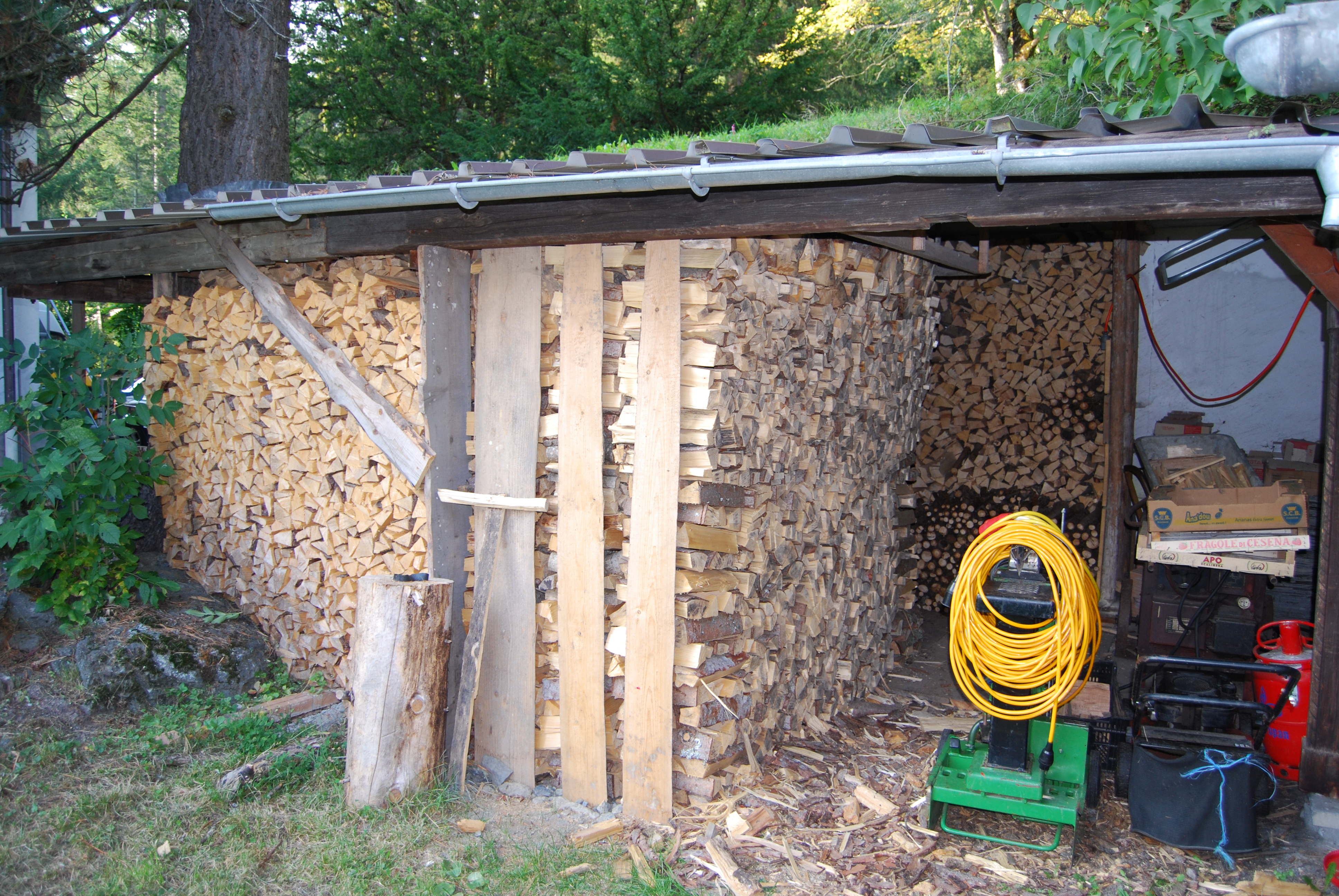 עצי הסקה